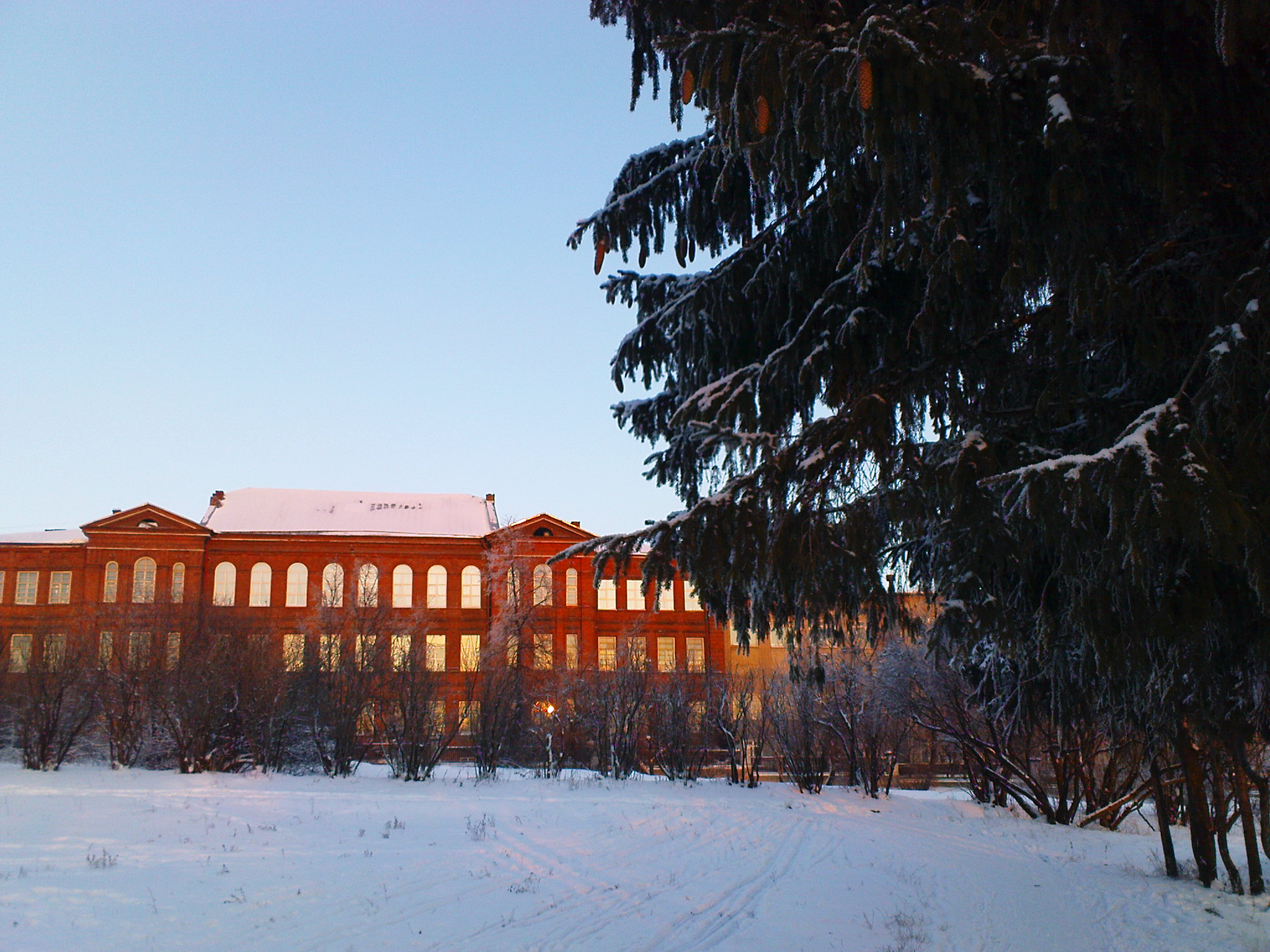 административный корпус МичГАУ